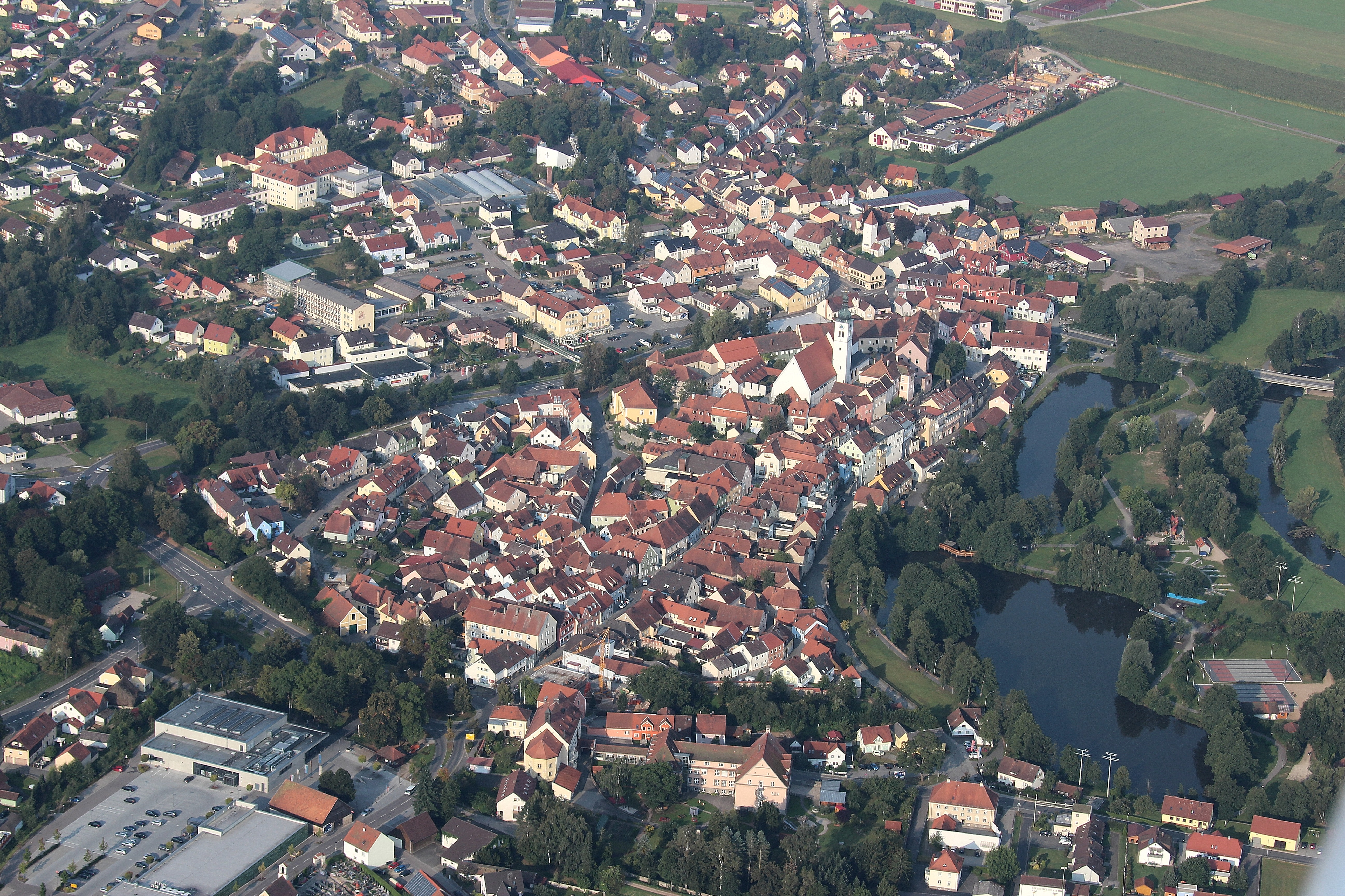 Stadtkern Neunburg vorm Wald, Landkreis Schwandorf, Oberpfalz, Bayern